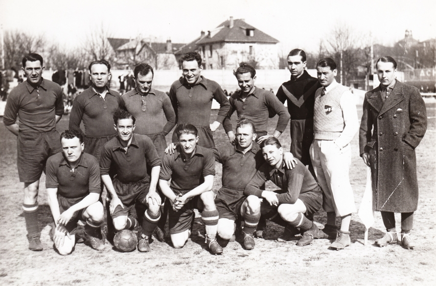 Photo prise lors du match Metz contre Mulhouse le 26 mars 1933 (match nul 3:3). Joueurs debout de gauche à droite : Mirka, Boè, Hauswirth, Thomas, Schmitt, Traver, Steyskal et Ekerlen. À genoux de gauche à droite : Fosset, Rohrbacher, Buhrer, André, Freiberger.